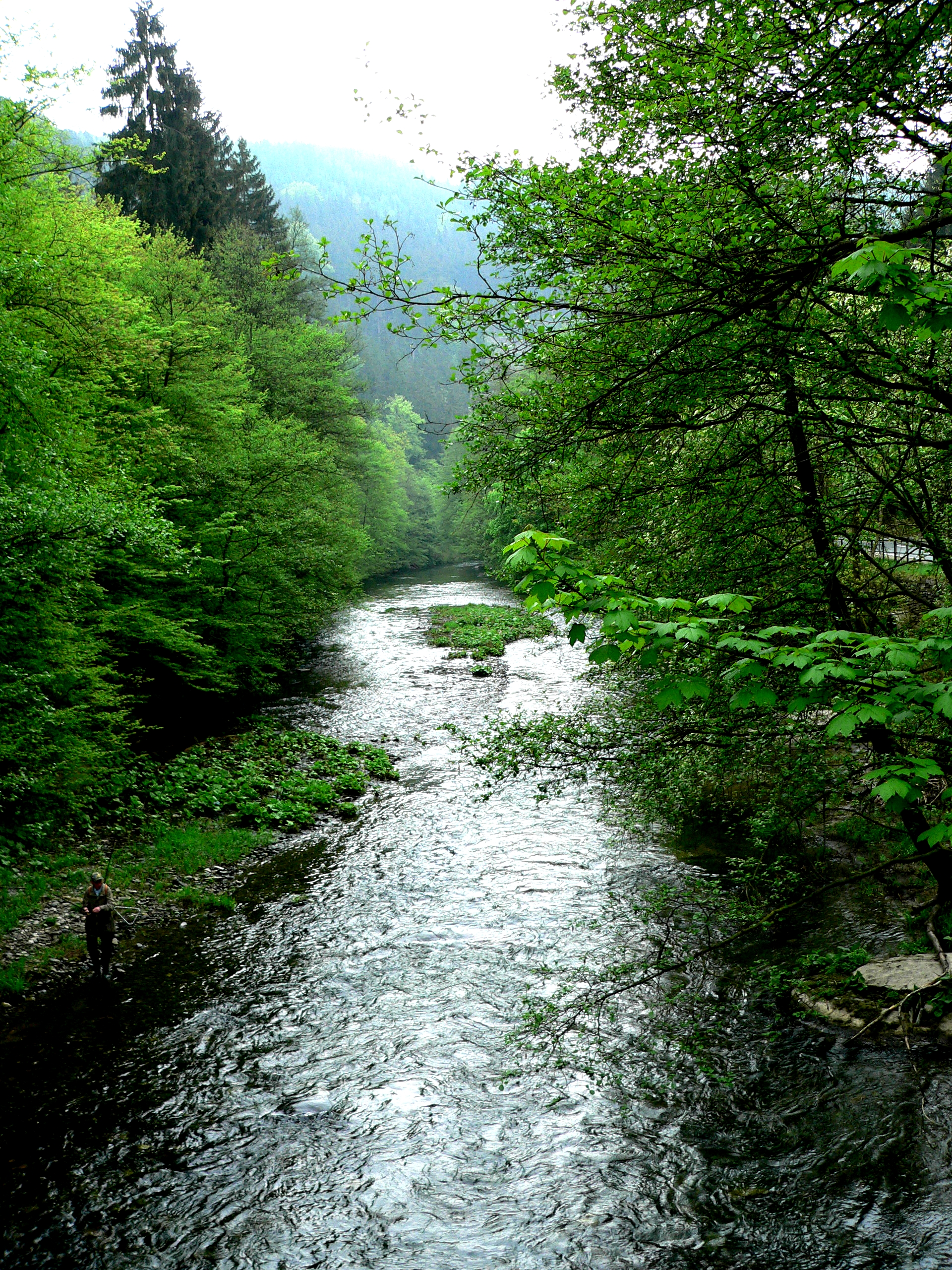 River Schwarza in may, Thuringia, Germany Das Flüsschen Schwarza im Mai, thüringisches Schiefergebirge